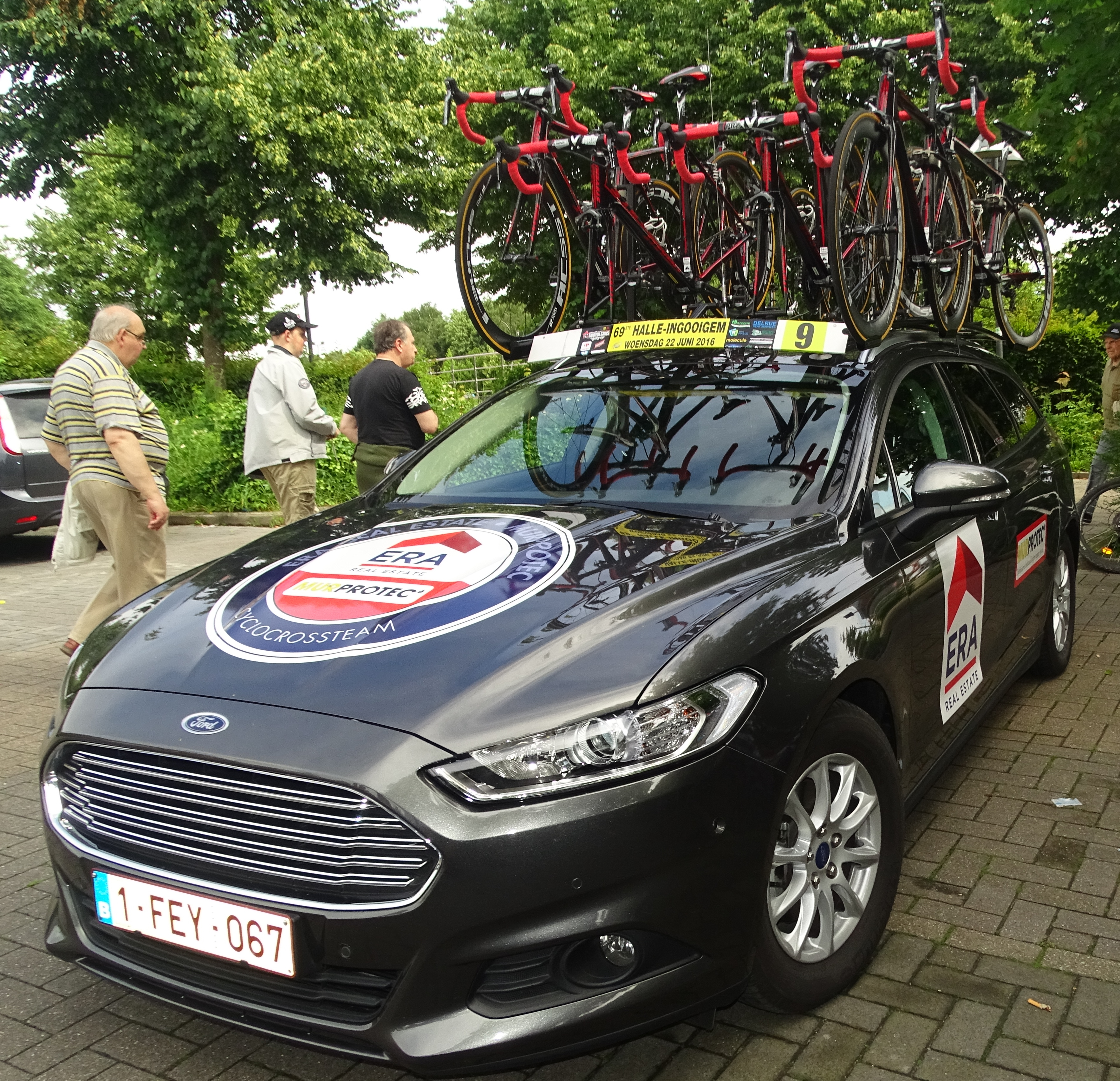 Reportage réalisé le mercredi 22 juin à l'occasion du départ de Halle-Ingooigem 2016 à Hal, Belgique.